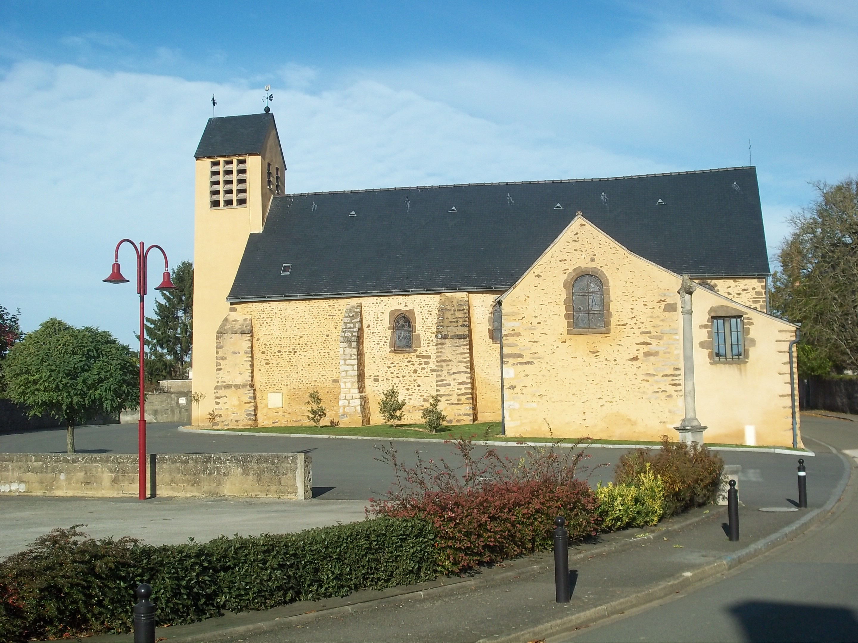 L'église